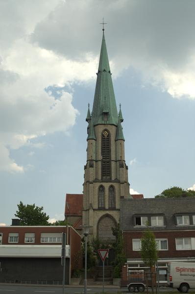 Die Kirche in Altenberge, frontal aufgenommen